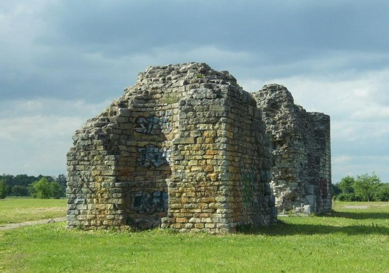 Saint-p